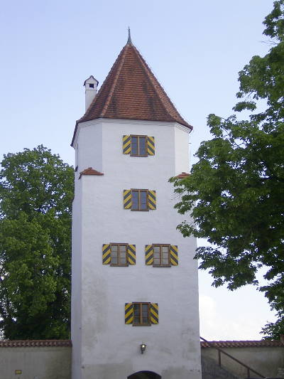 Der Polizeidienerturm in Schongau